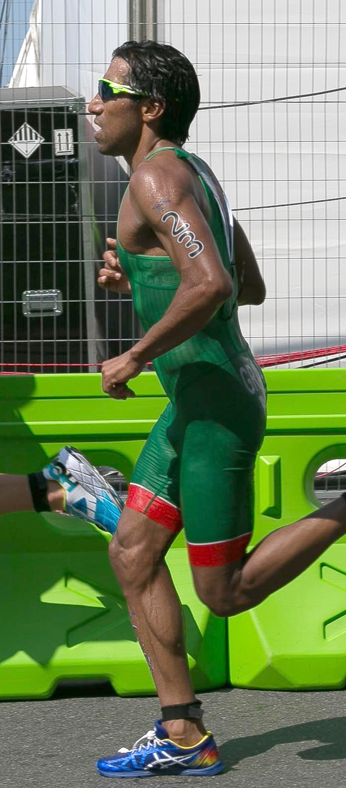 Atletas do Triatlo Masculino durante corrida, Copacabana , Rio de Janeiro